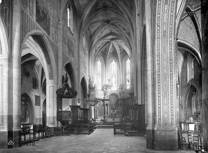 Nef de la cathédrale Saint-Pierre d'Annecy. Photographie de Séraphin-Médéric Mieusement.